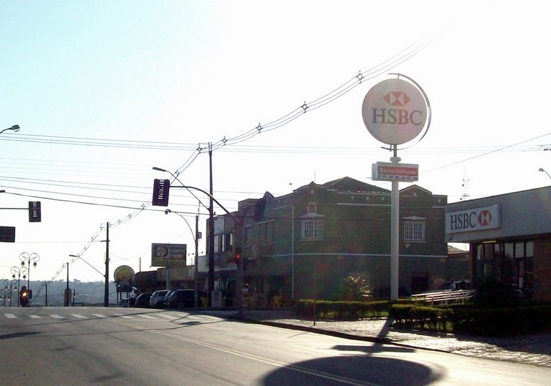 Centro da cidade de Quatro Barras (Grande Curitiba), PR, Sul do Brasil.